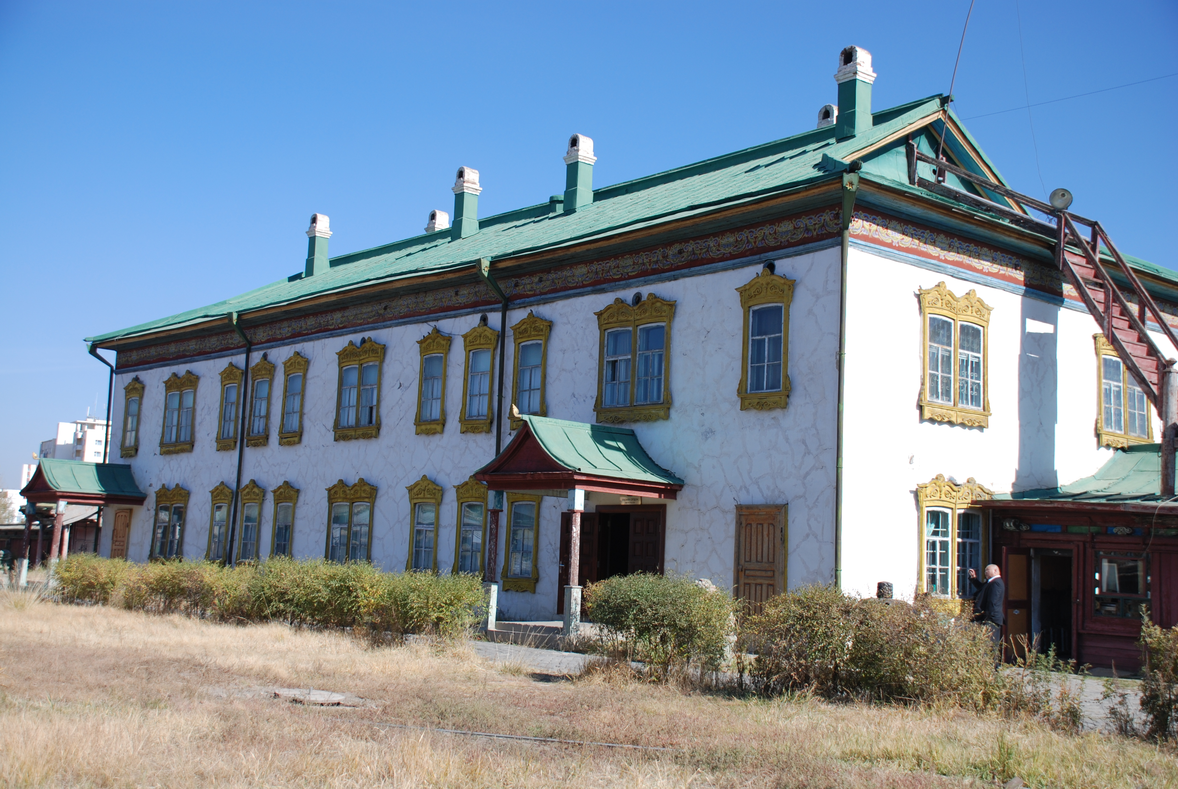 Casa del último Khan